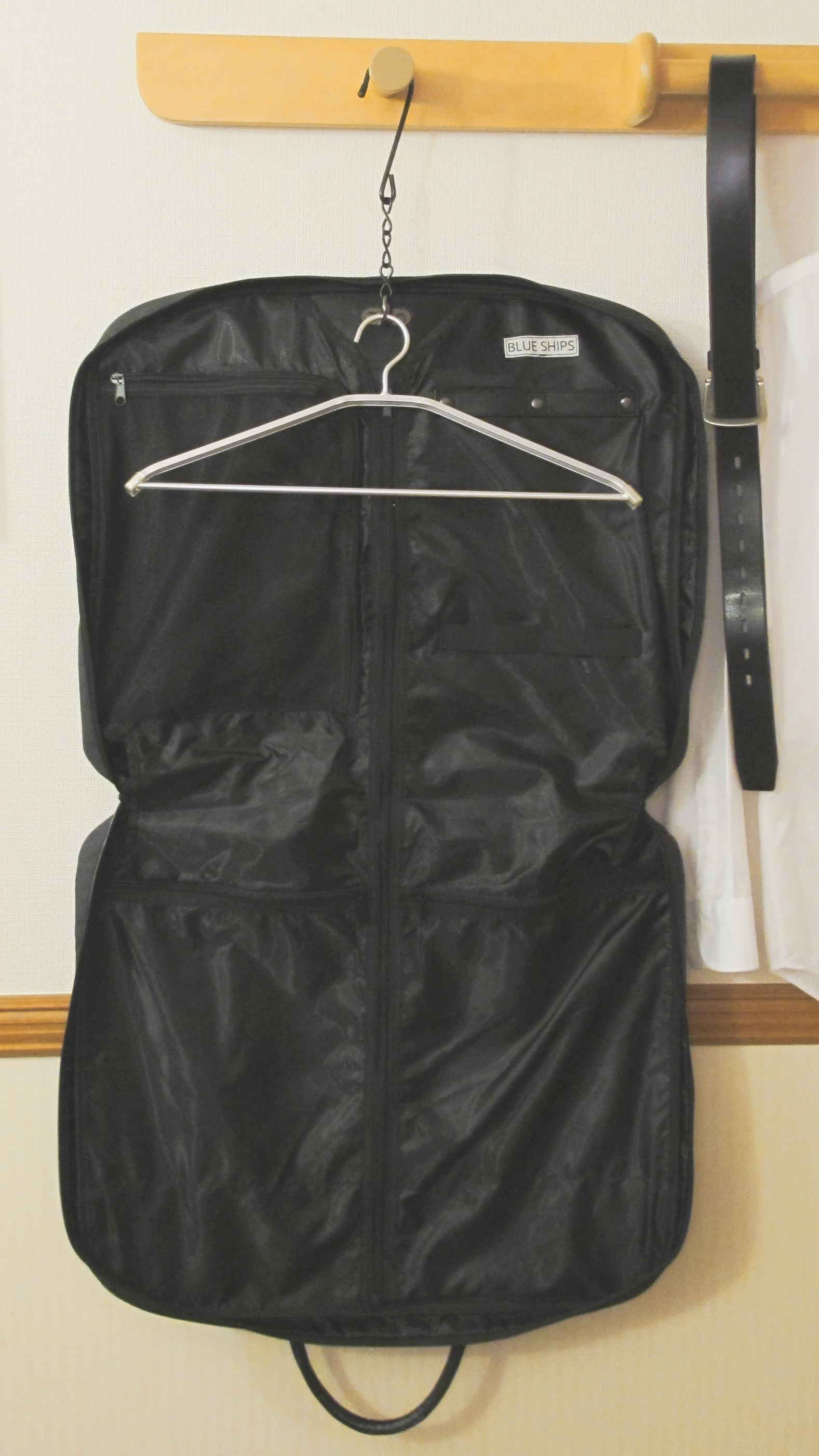 @会津若松市/福島県